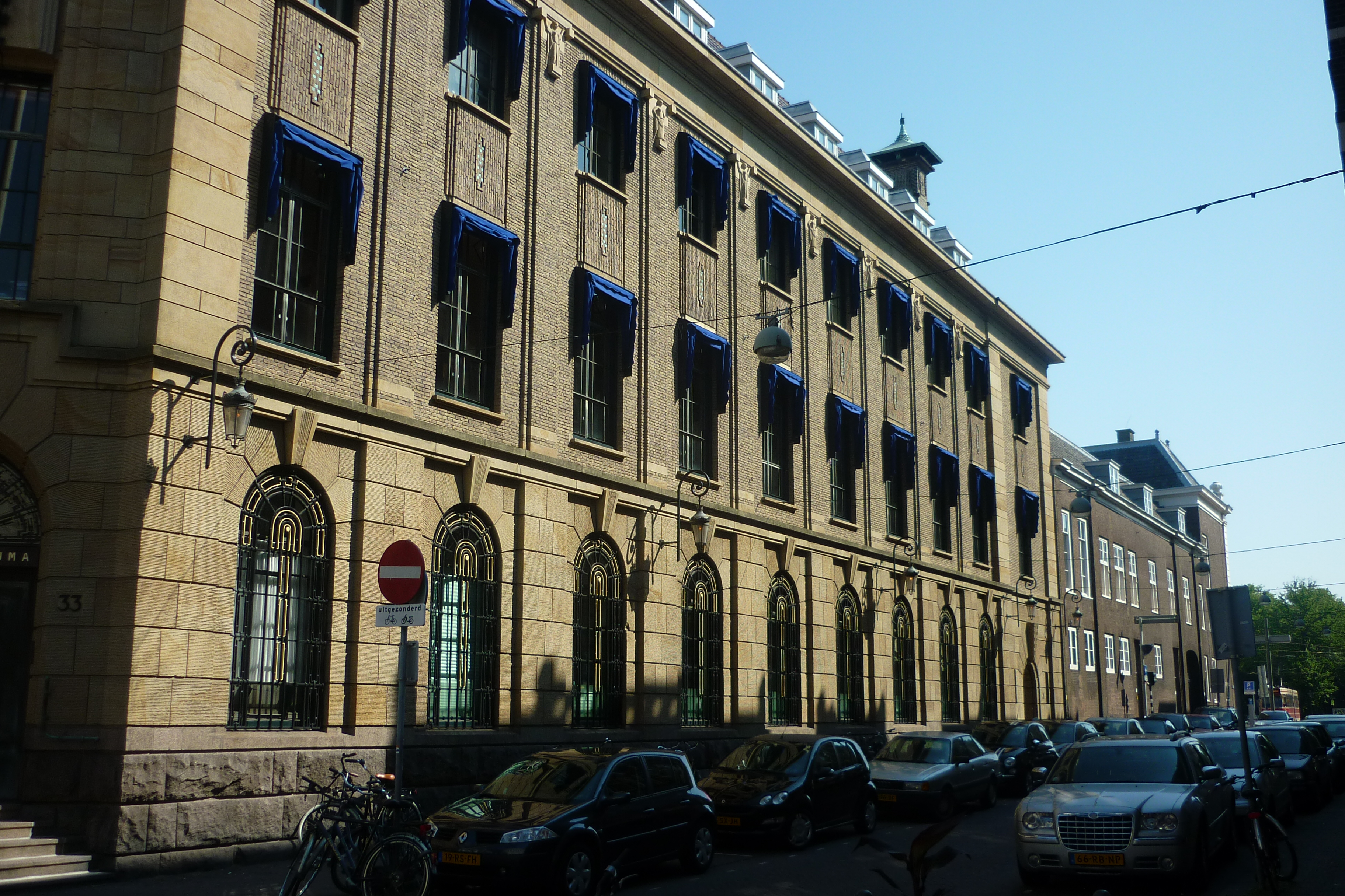 Den Haag, Heulstraat zeezijde